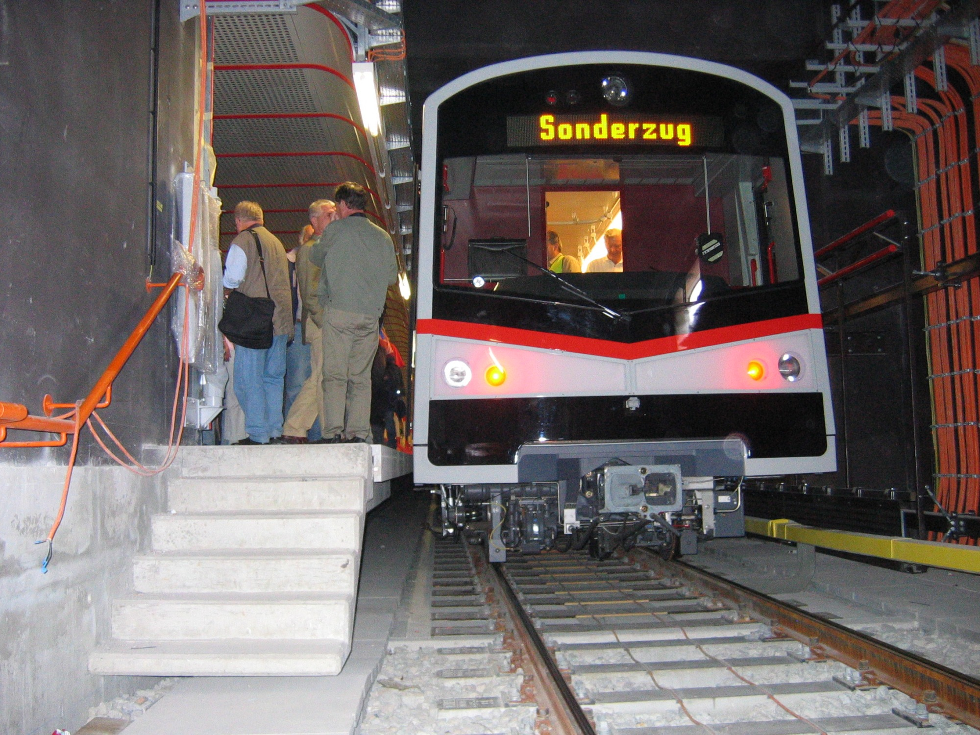 en: V-type metro car with special excursion train in Leopoldau station de: Sonderzug für eine Baustellenbesichtigung mit V-Triebwagen in Leopoldau